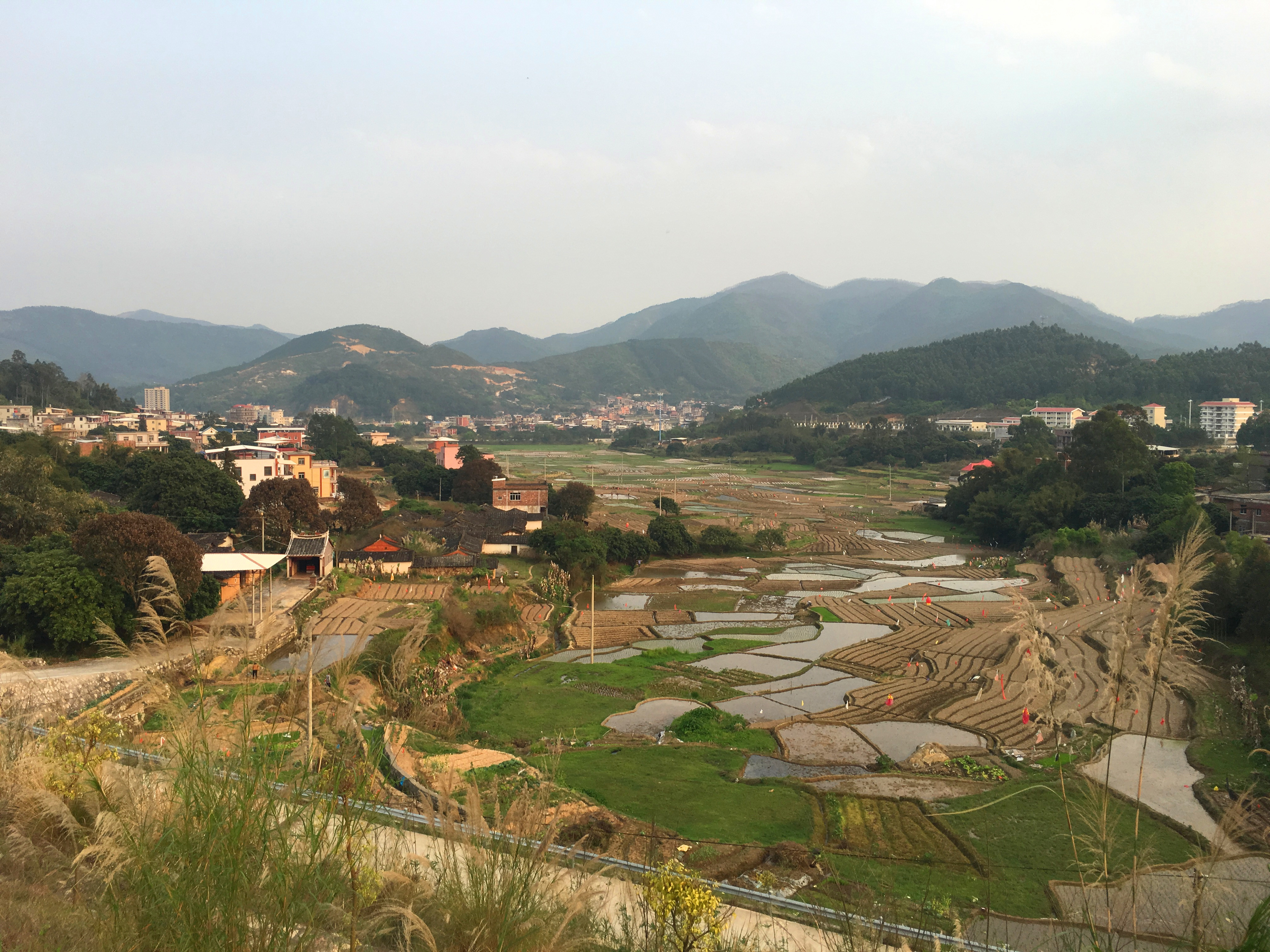 从S35福诏高速上拍摄的乐峰镇